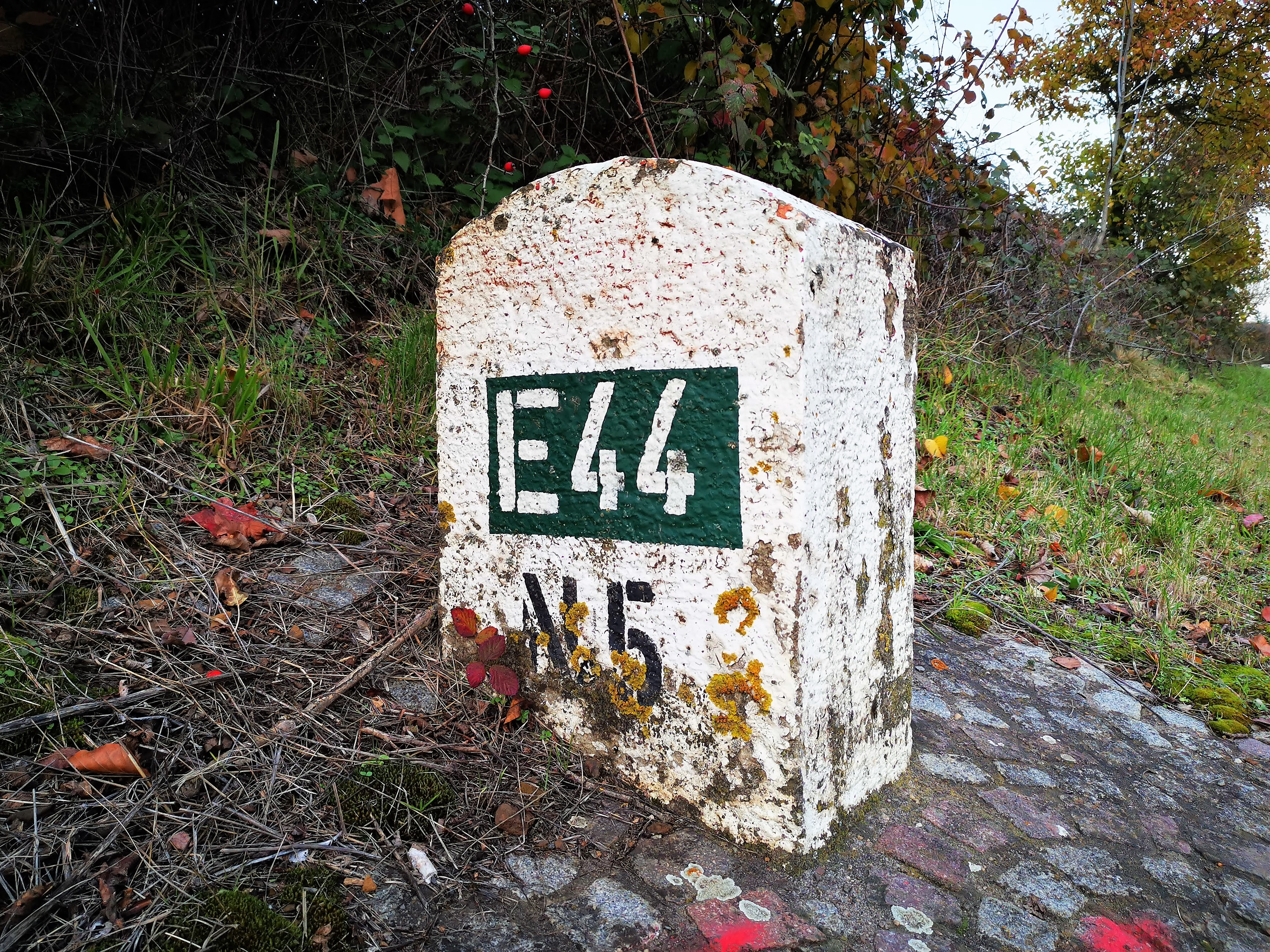 Borne kilométrique E44/N5 à Sprinkange, Luxembourg.